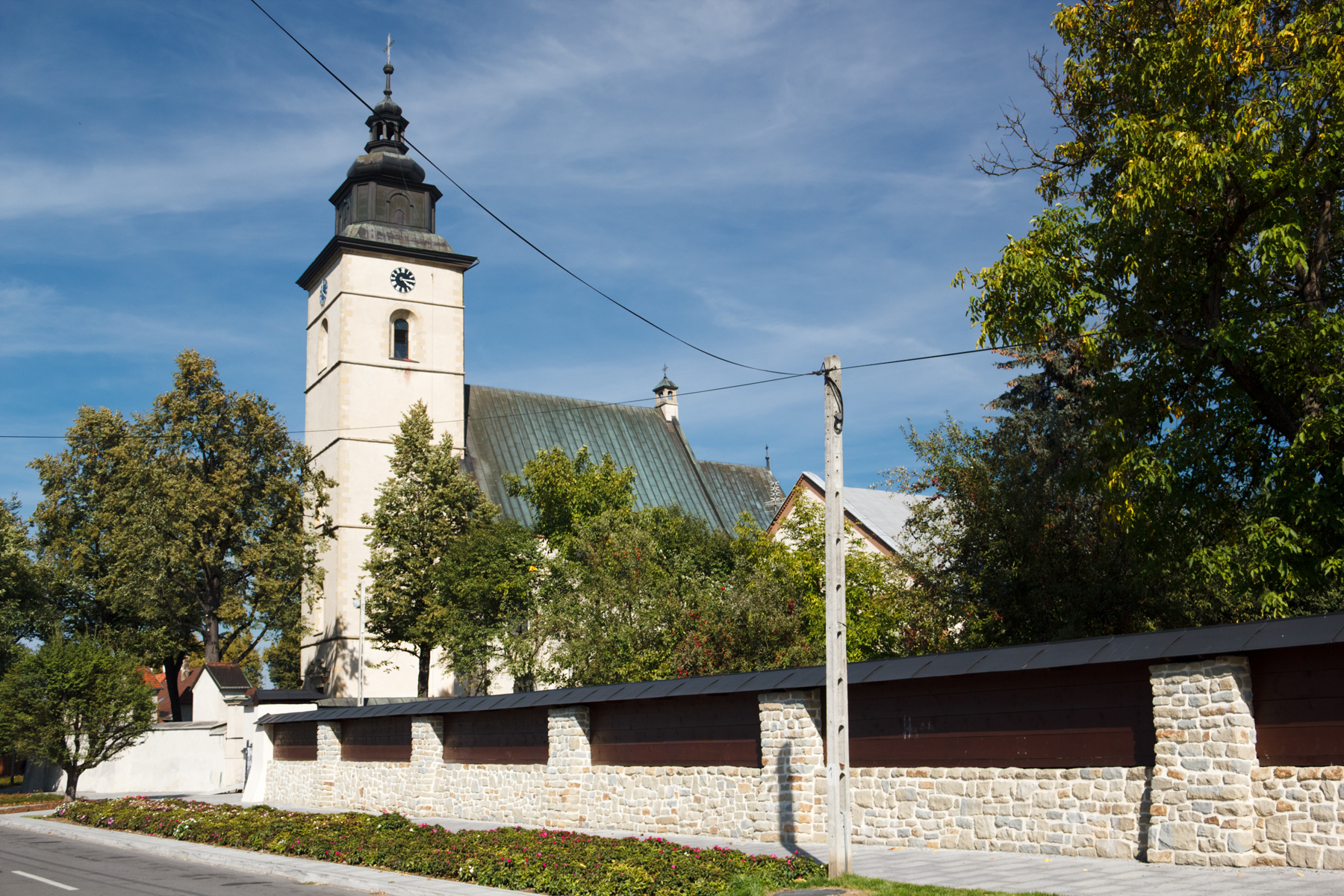 Kościół par. p.w. św. Elżbiety Stary Sącz, Stary Sącz